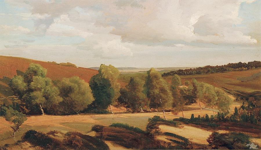 Ansicht der Wilseder Höhe in der Nordheide